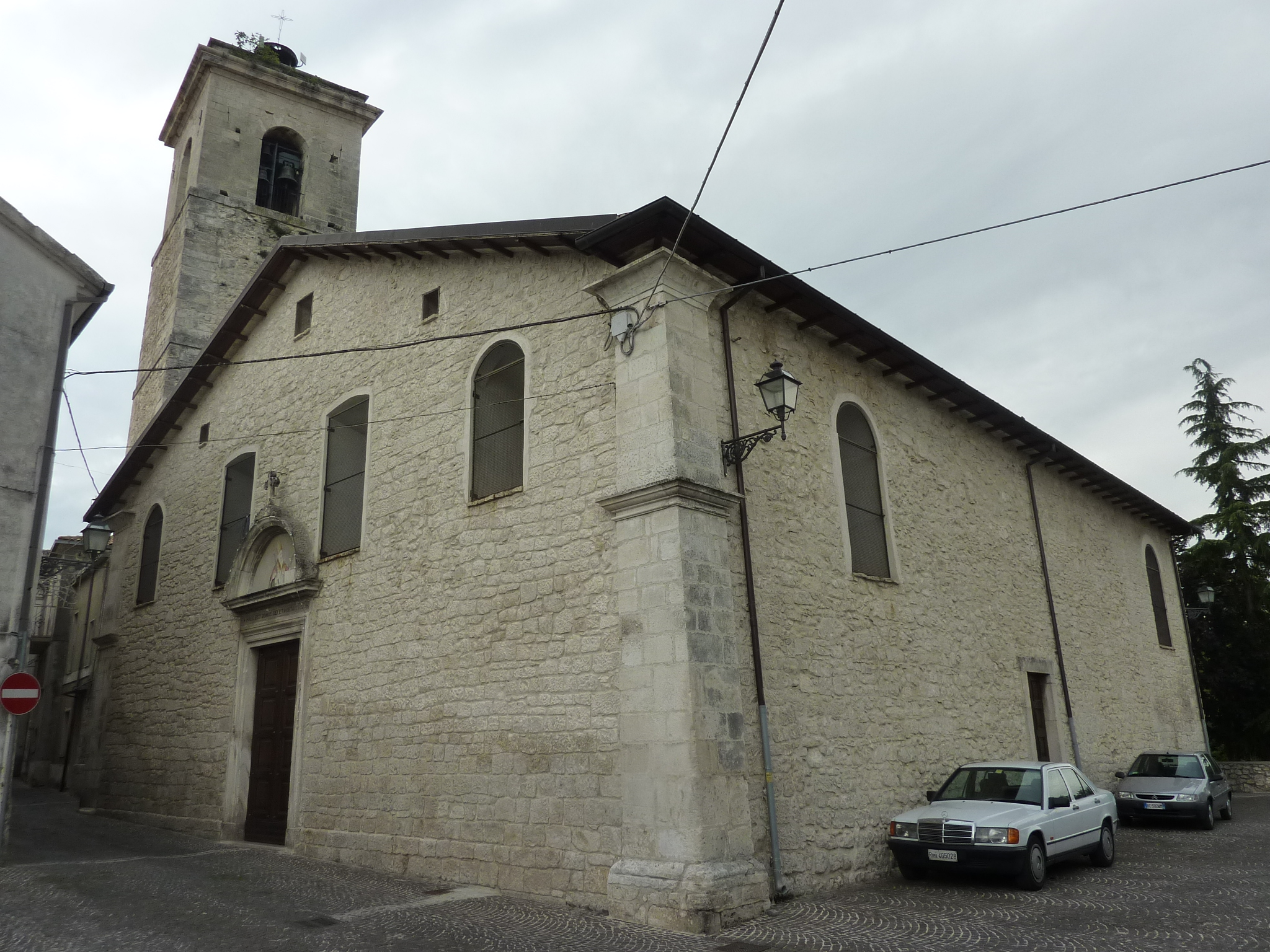 Roccamorice: Chiesa di San Donato Vescovo e Martire